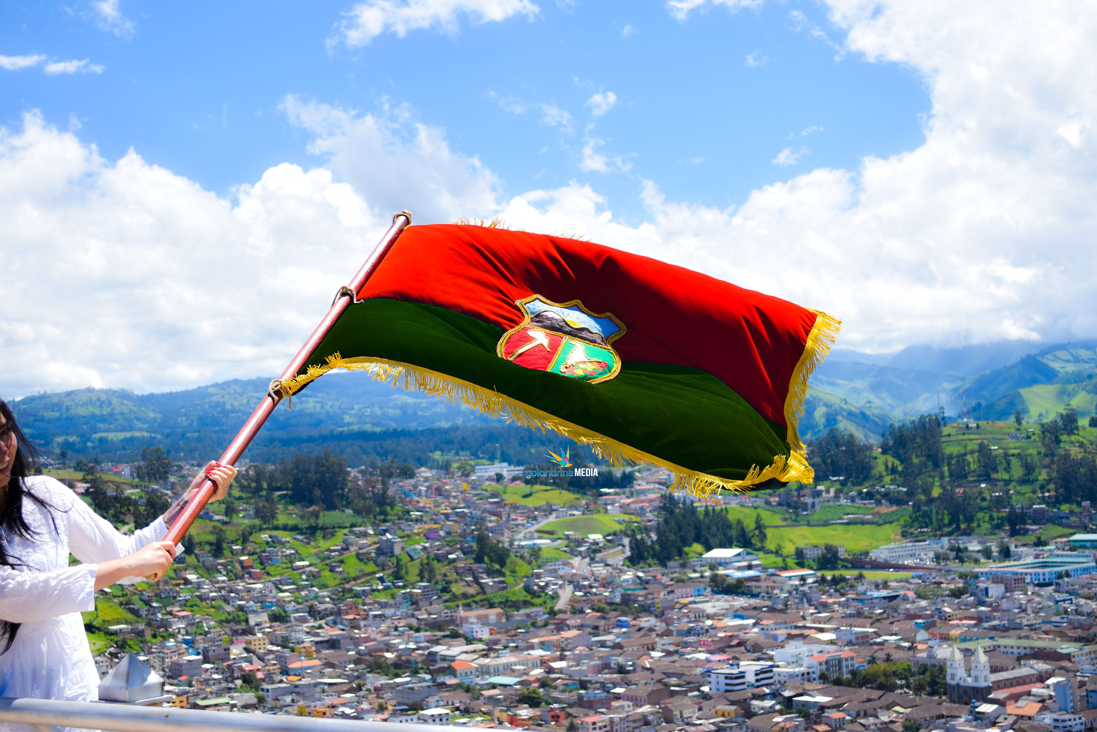 Bandera y Escudo de la provincia de Bolívar